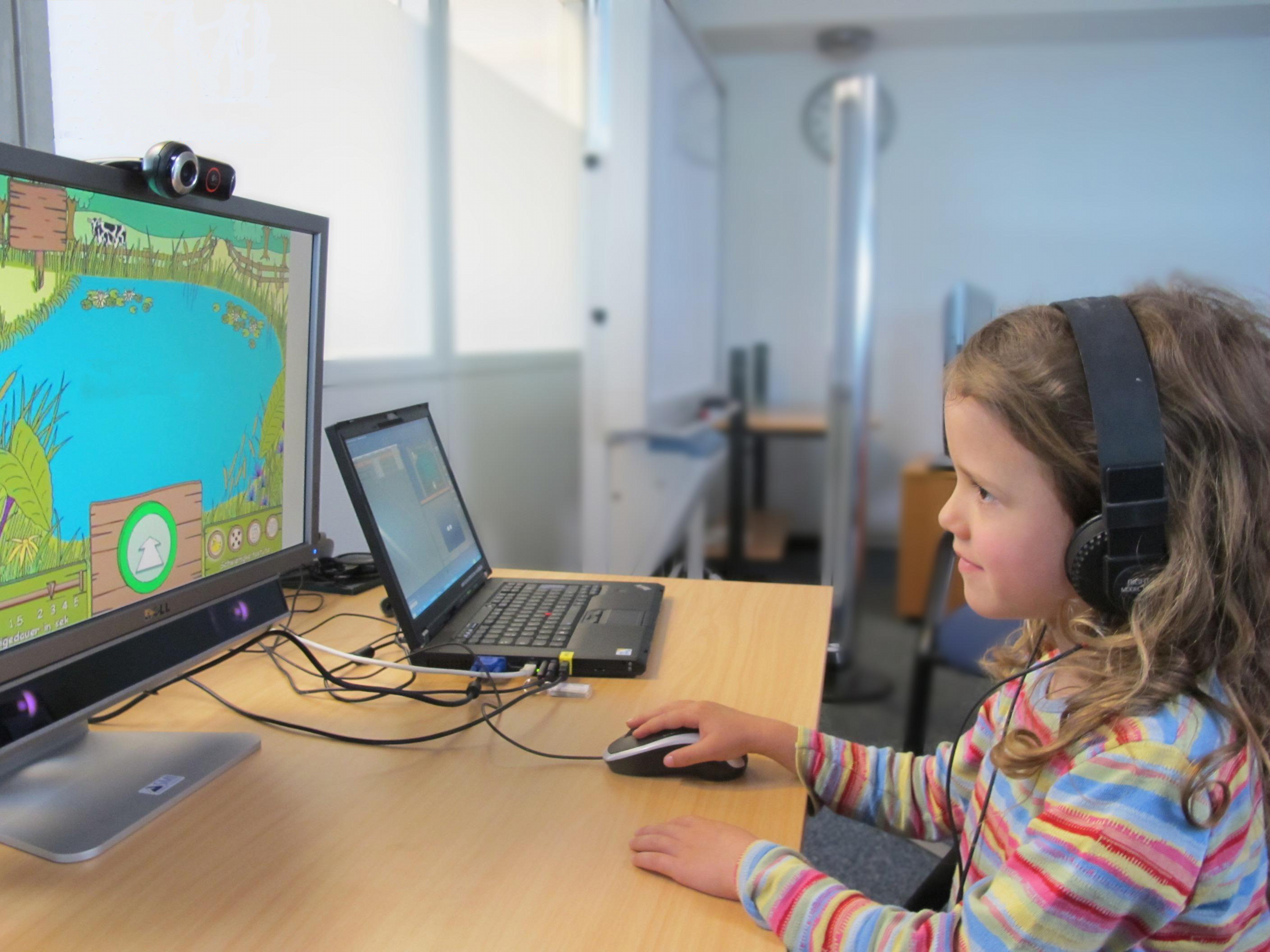 Rysunek przedstawiający dziecko korzystające z gry komputerowej (najlepiej o charakterze edukacyjnym) English | polski | +/−